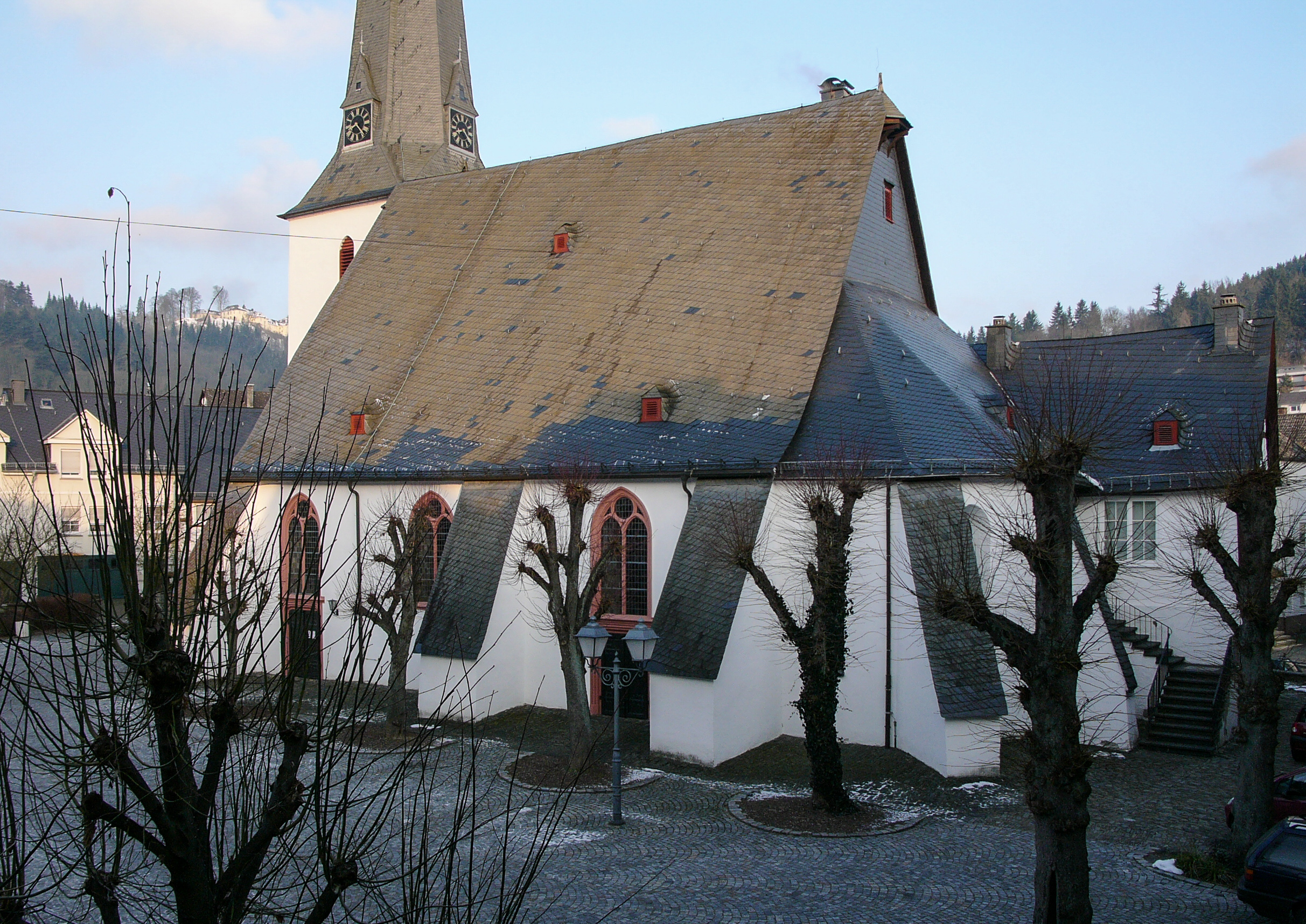 Bad Laasphe, historischer Stadtkern, Stadtkirche aus dem 13. Jahrhundert